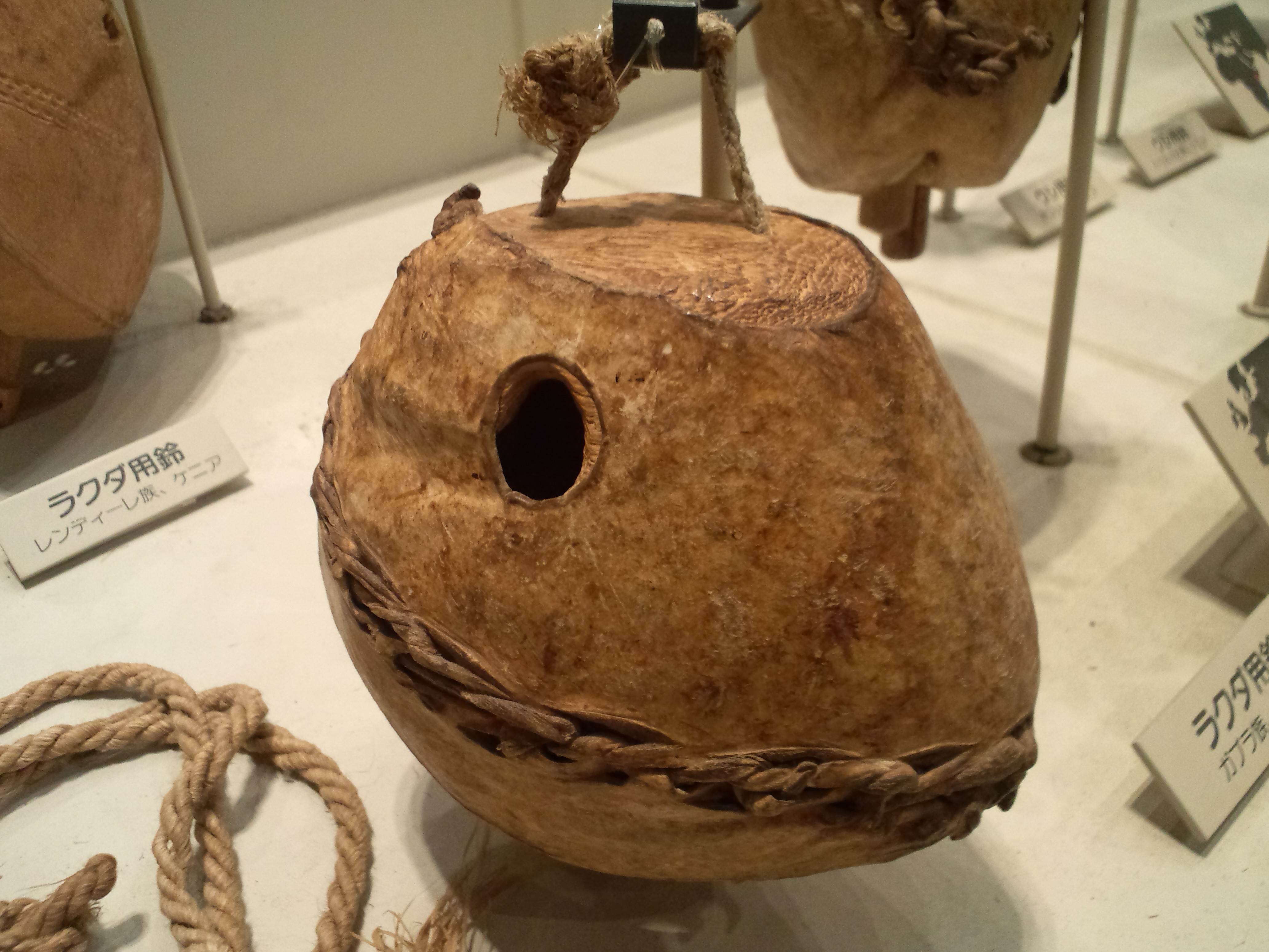 リトルワールド 本館展示室 ラクダ用鈴（ケニア、ガブラ族）